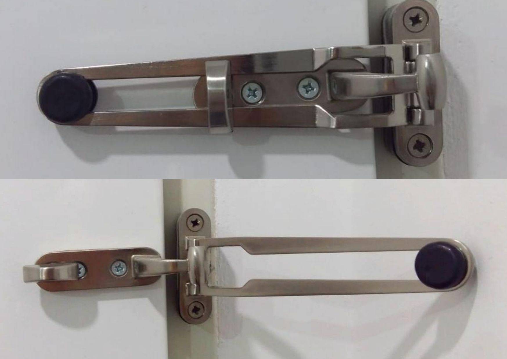 בריח פנימי לדלת כניסה במצב מוברח ובמצב פתוח. הבריח מאפשר גם פתיחה מאובטחת של הדלת לחרך